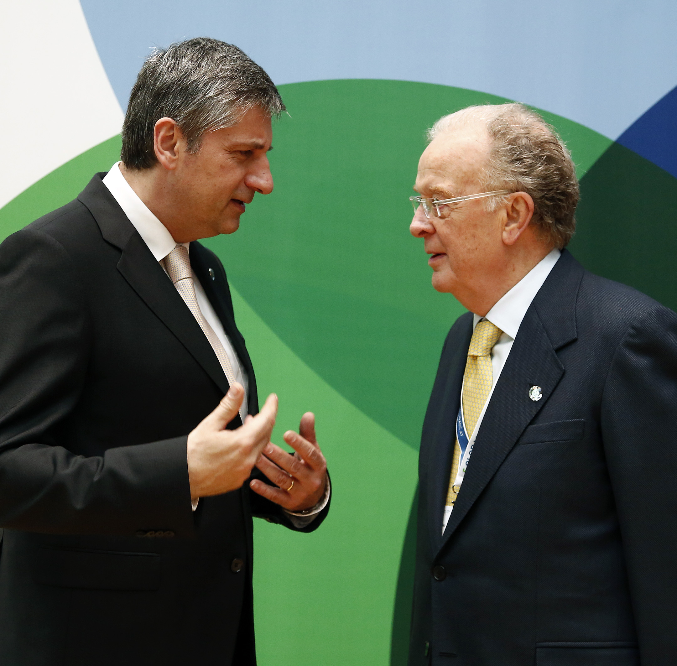 5. Global Forum der Allianz der Zivilisationen der Vereinten Nationen in Wien, 27./28. Februar 2013; Aussenminister Michael Spindelegger begrüsst den UNAOC Repräsentanten Jorge Sampaio; Foto: Dragan Tatic